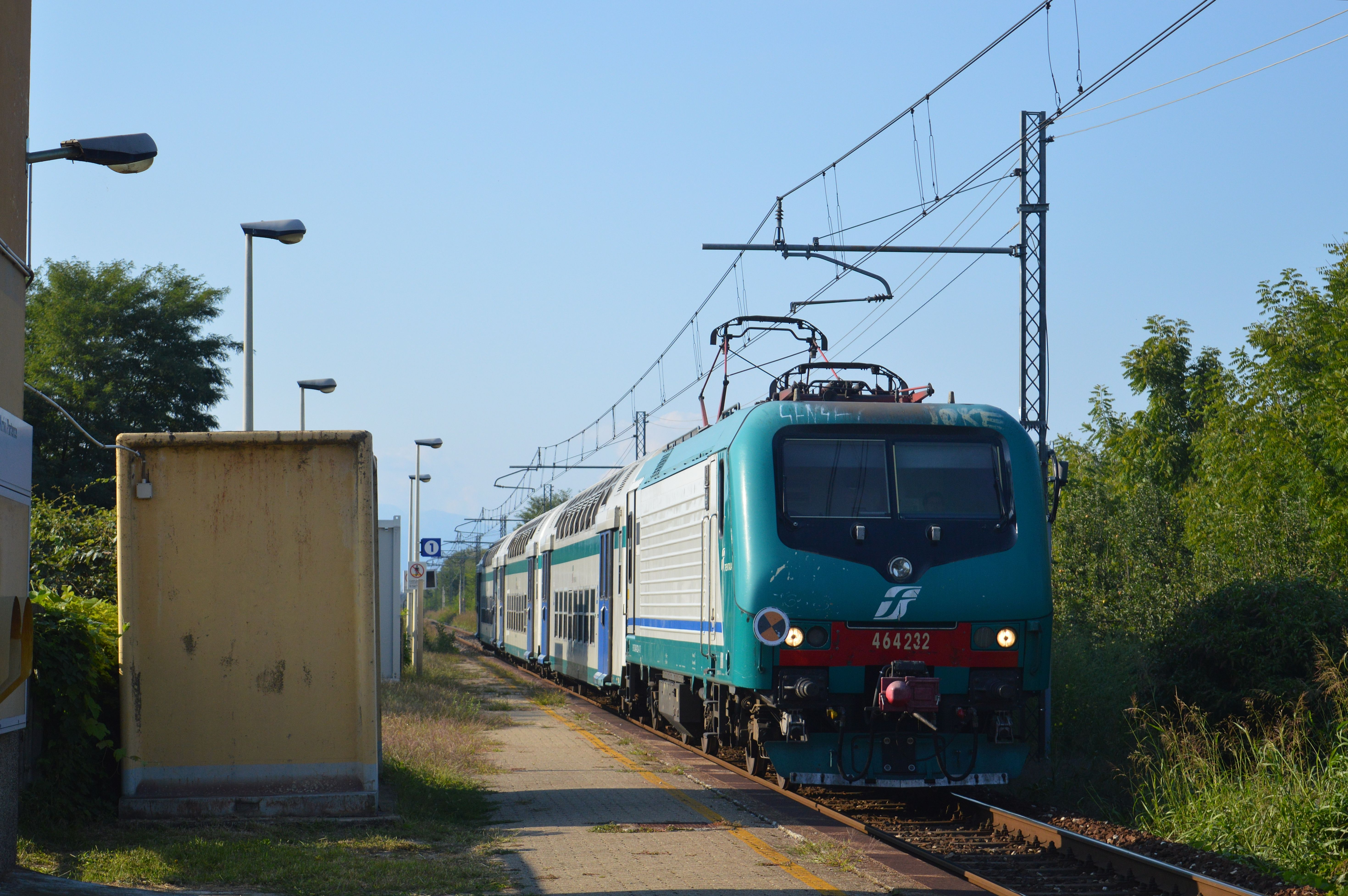 Treno regionale in transito nella stazione di Vaprio d’Agogna